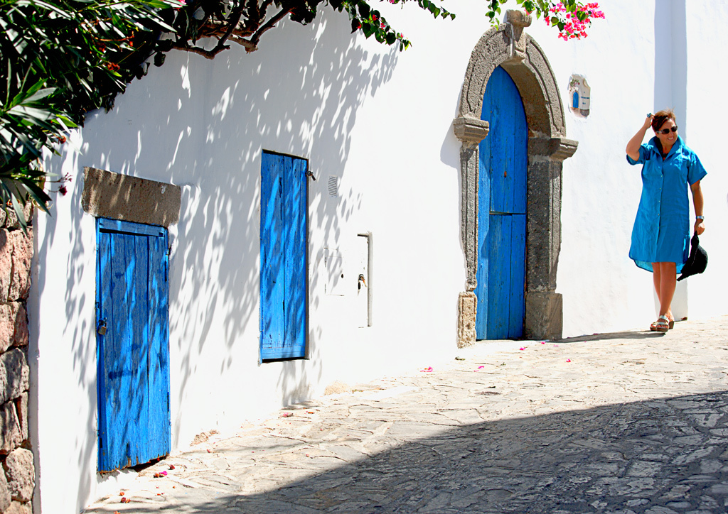 MyBlue